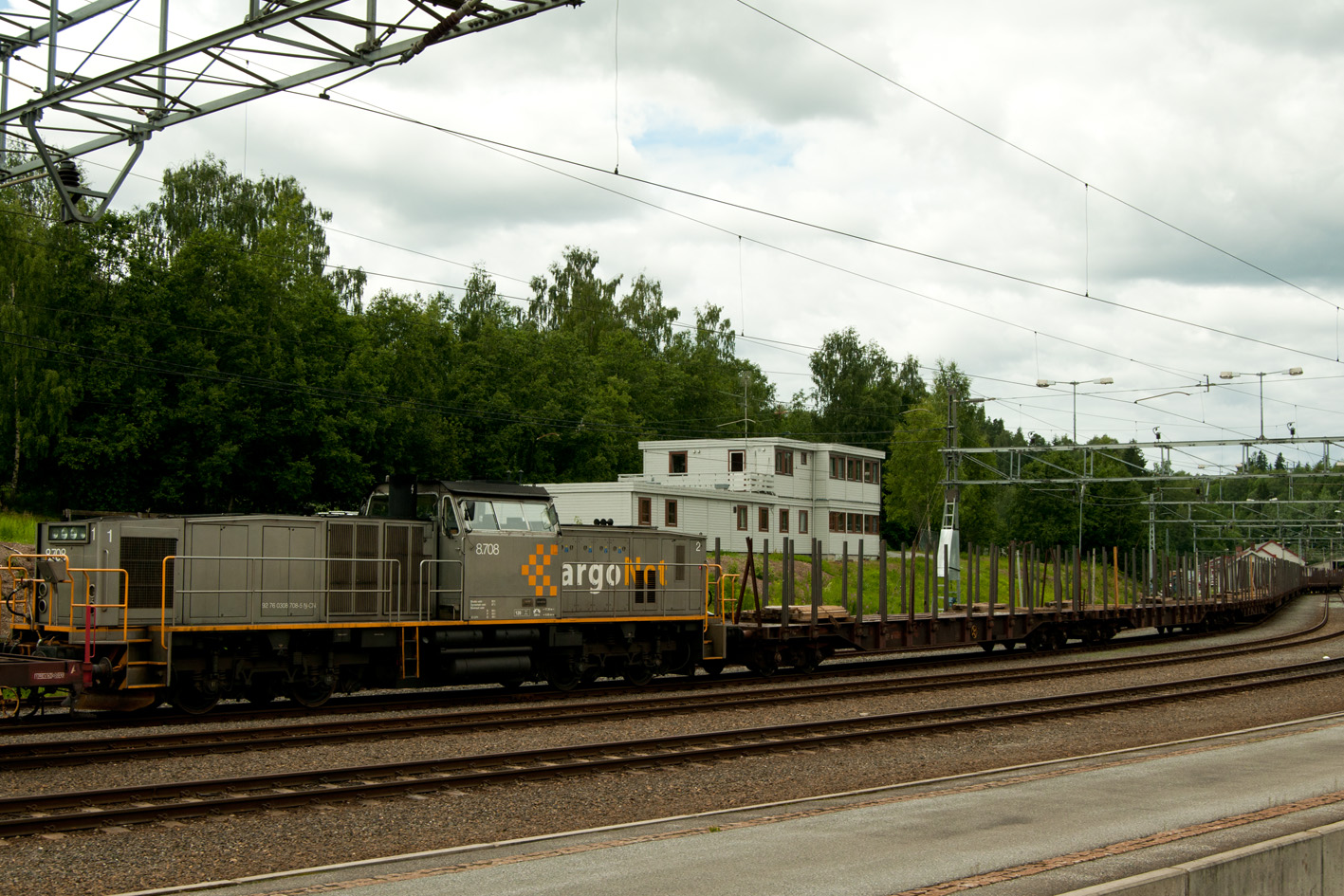 Di. 8 i CargoNet-design